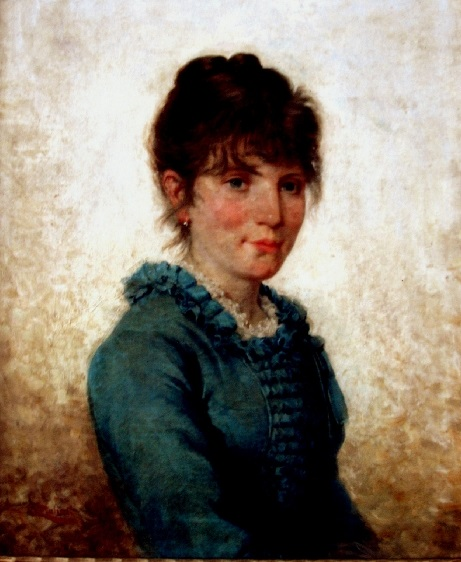 Ritratto di fanciulla, 68 x 56 cm, olio su tela, collezione privata